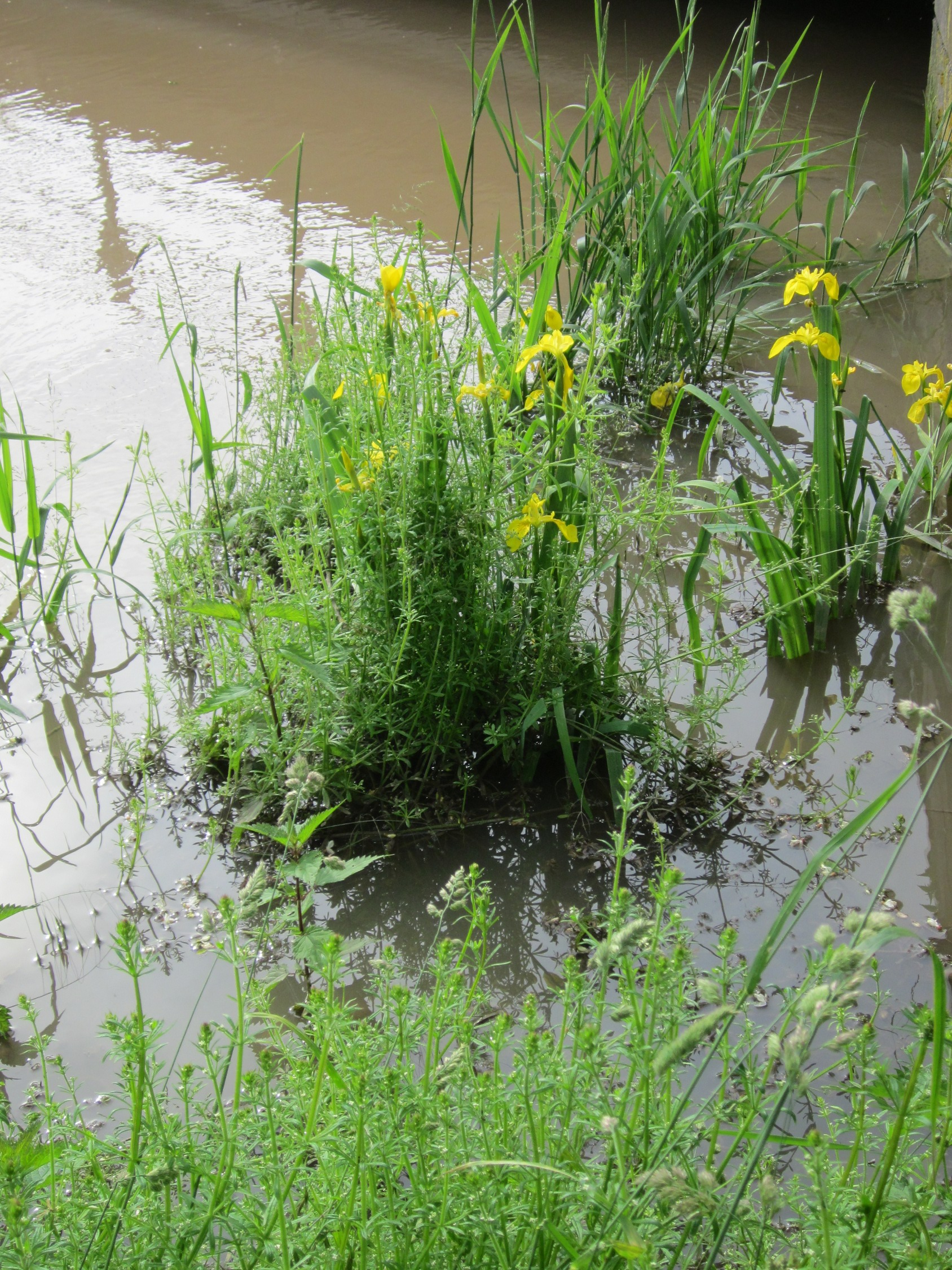 Sumpf-Schwertlilie (Iris pseudacorus) im Hockenheimer Rheinbogen